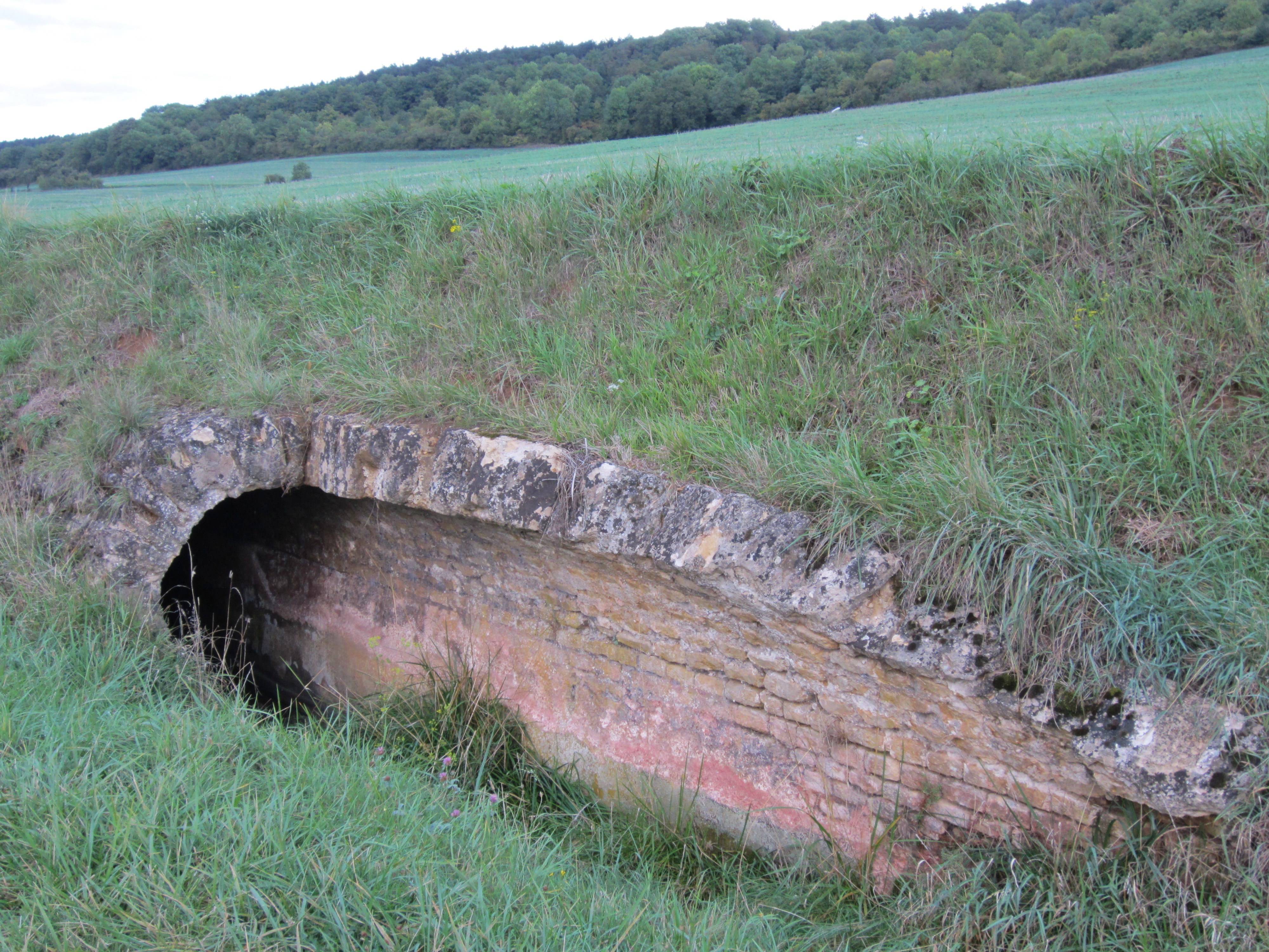 vestiges aqueduc Noveant Gorze